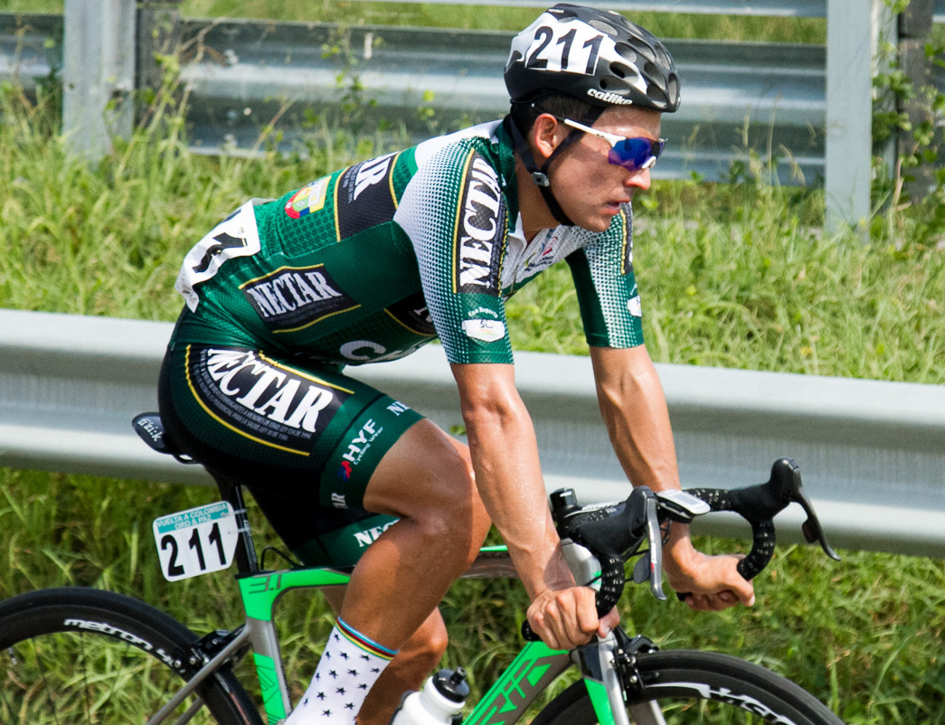 Camilo Castiblanco Etapa 3 Vuelta a Colombia 2017 Jueves 3 de agosto de 2017. Puerto Boyacá - Barrancabermeja.